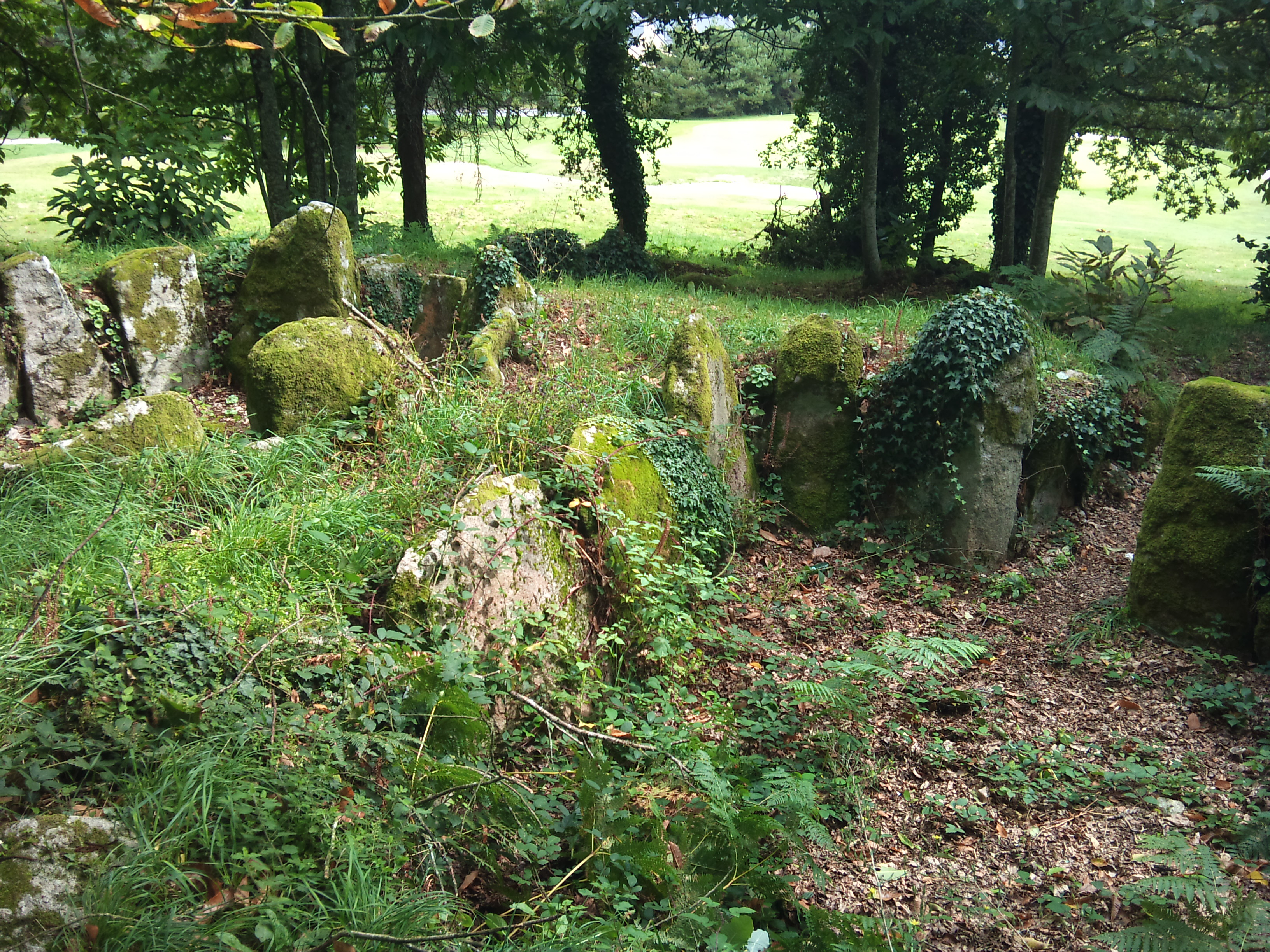 L'ancien tumulus= de Kerroc’h est un cairn mégalithique, composé de dolmens formant une chambre, occupé à l'âge de Bronze. Il est aussi nommé « Trou des chouan », suite à sa réutilisation lors de la Révolution française. Les fouilles de 1904 sous la direction du Commandant Le Pontois, y ont mis à jour ossements, silex, haches polies et poteries, mais ont fait disparaître le tertre (restauré depuis). Enclavé dans le golf du Val Queven, il est toutefois librement accessible au public depuis le hameau de Kerroc’h, distant de quelques dizaines de mètres.